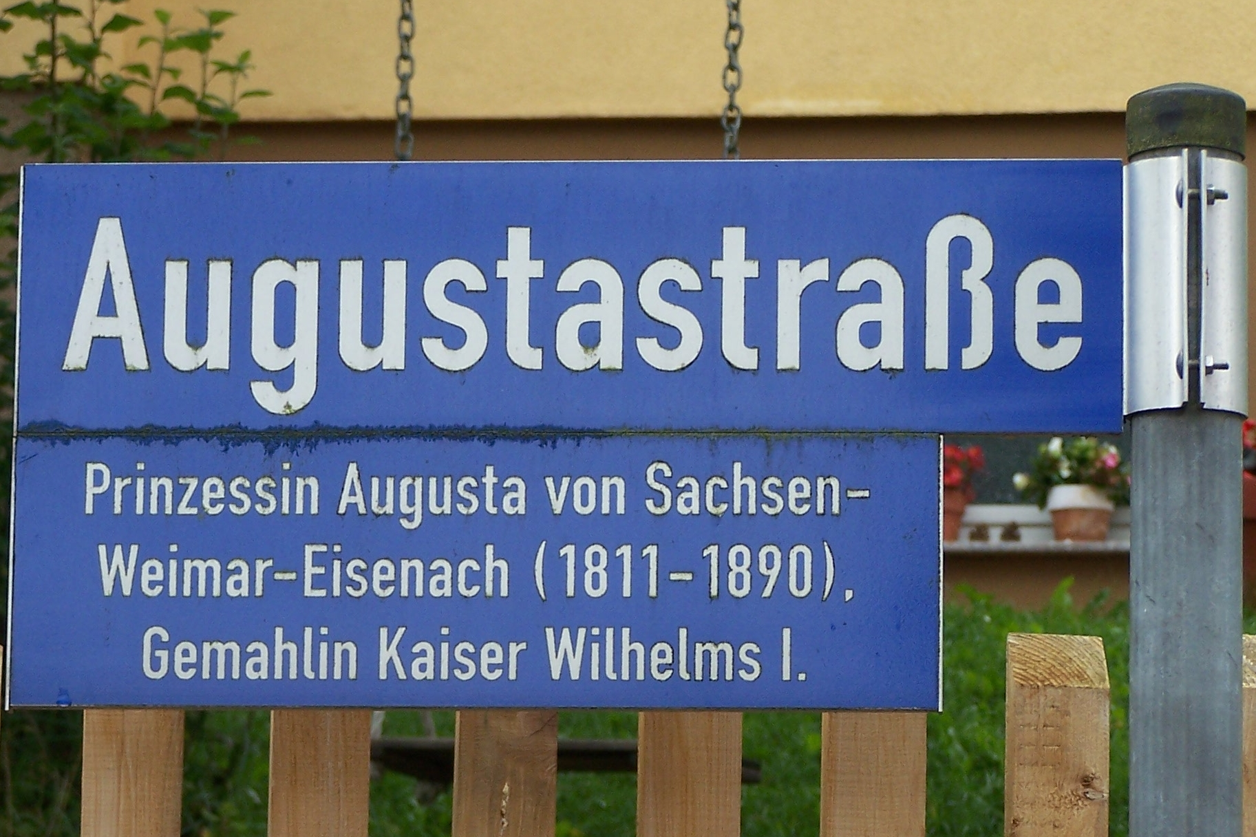 Straßenschild und Erläuterung zur Augustastraße.